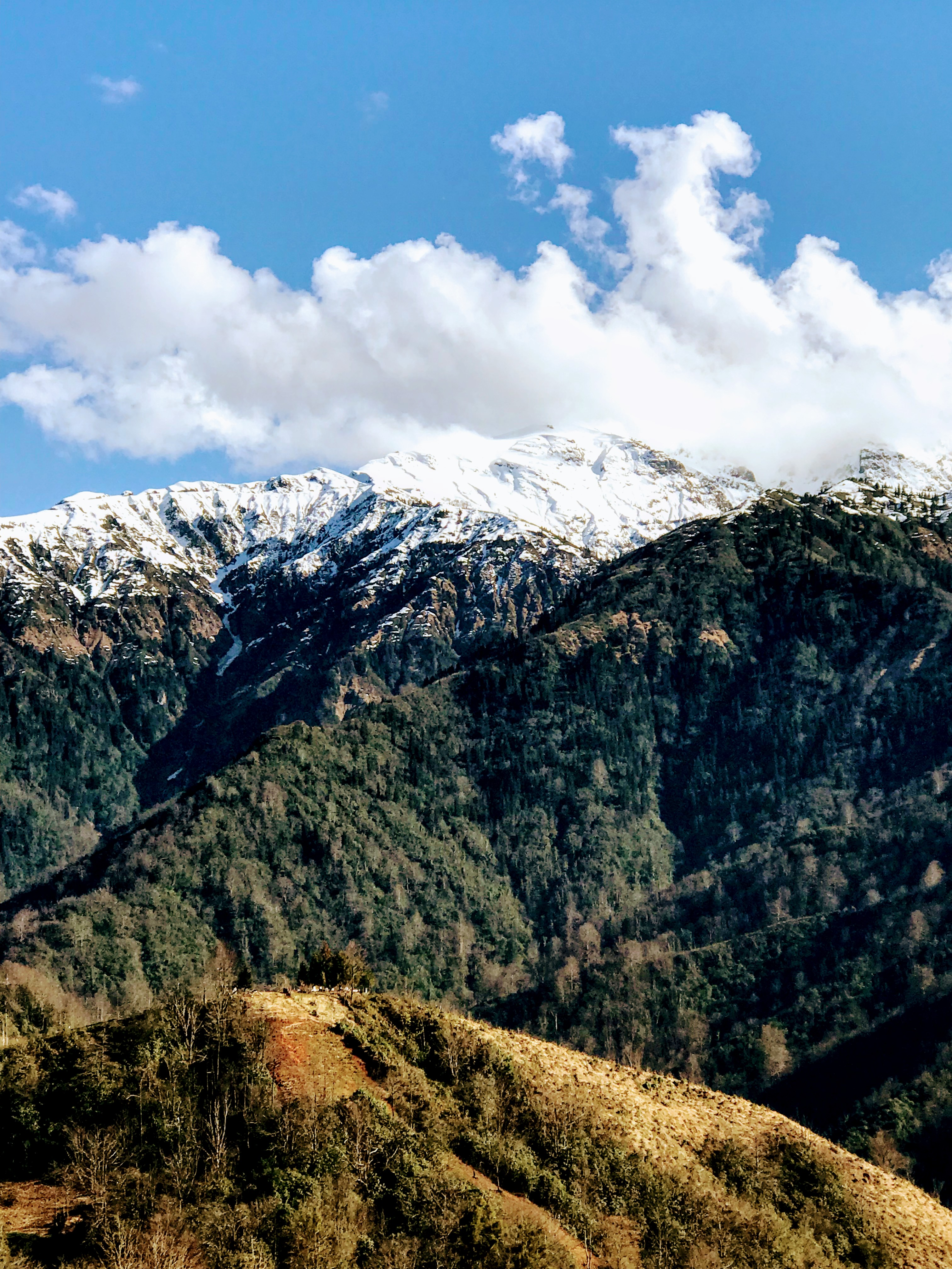 Rize ilinin Fındıklı ilçesine bağlı Yenişehitlik köyünde çekilmiş bir karlı dağ görüntüsüdür.